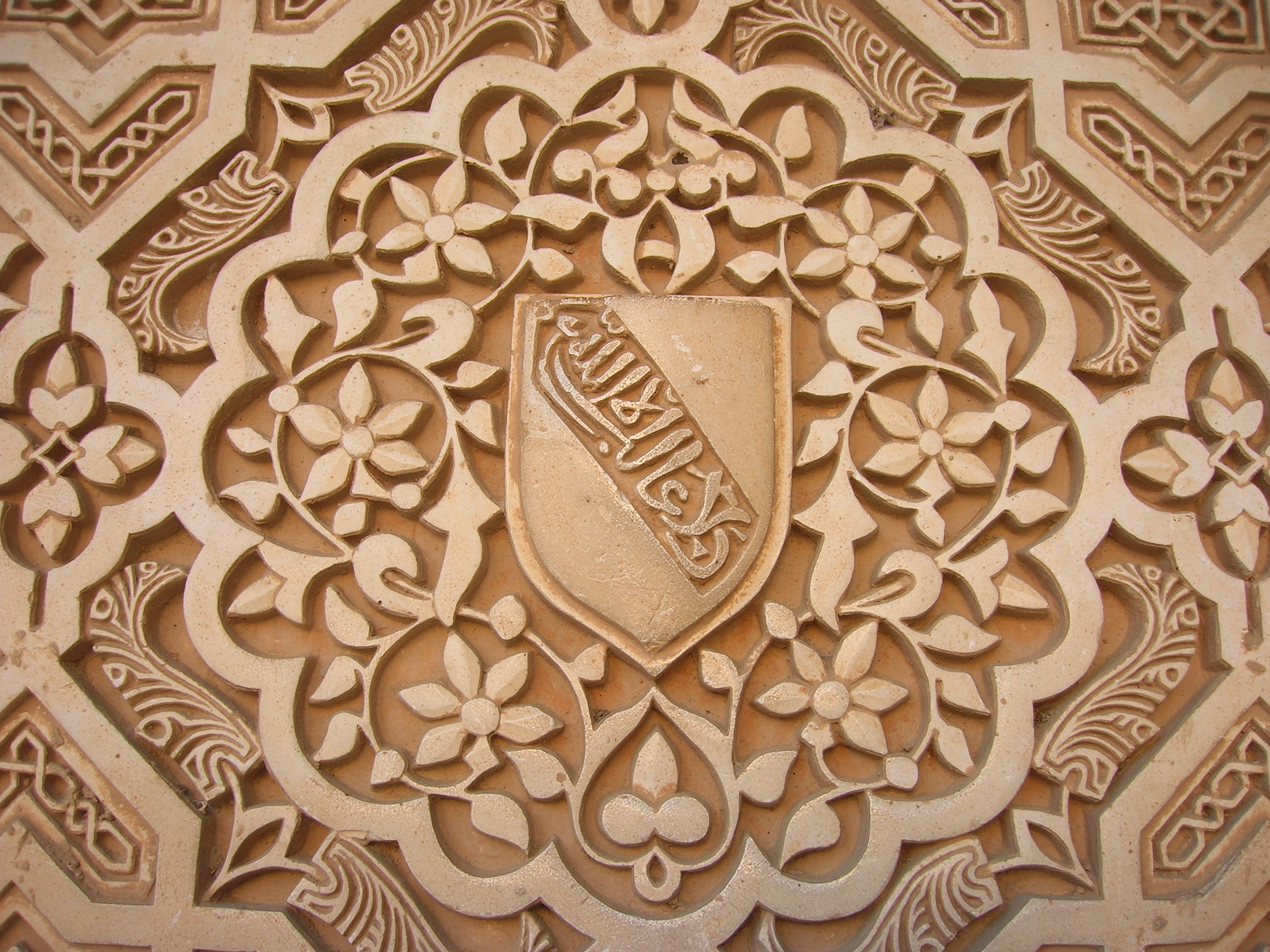 Labra heráldica con las armas de la dinastía nazarí del reino de Granada. Palacio de la Alhambra, Granada.